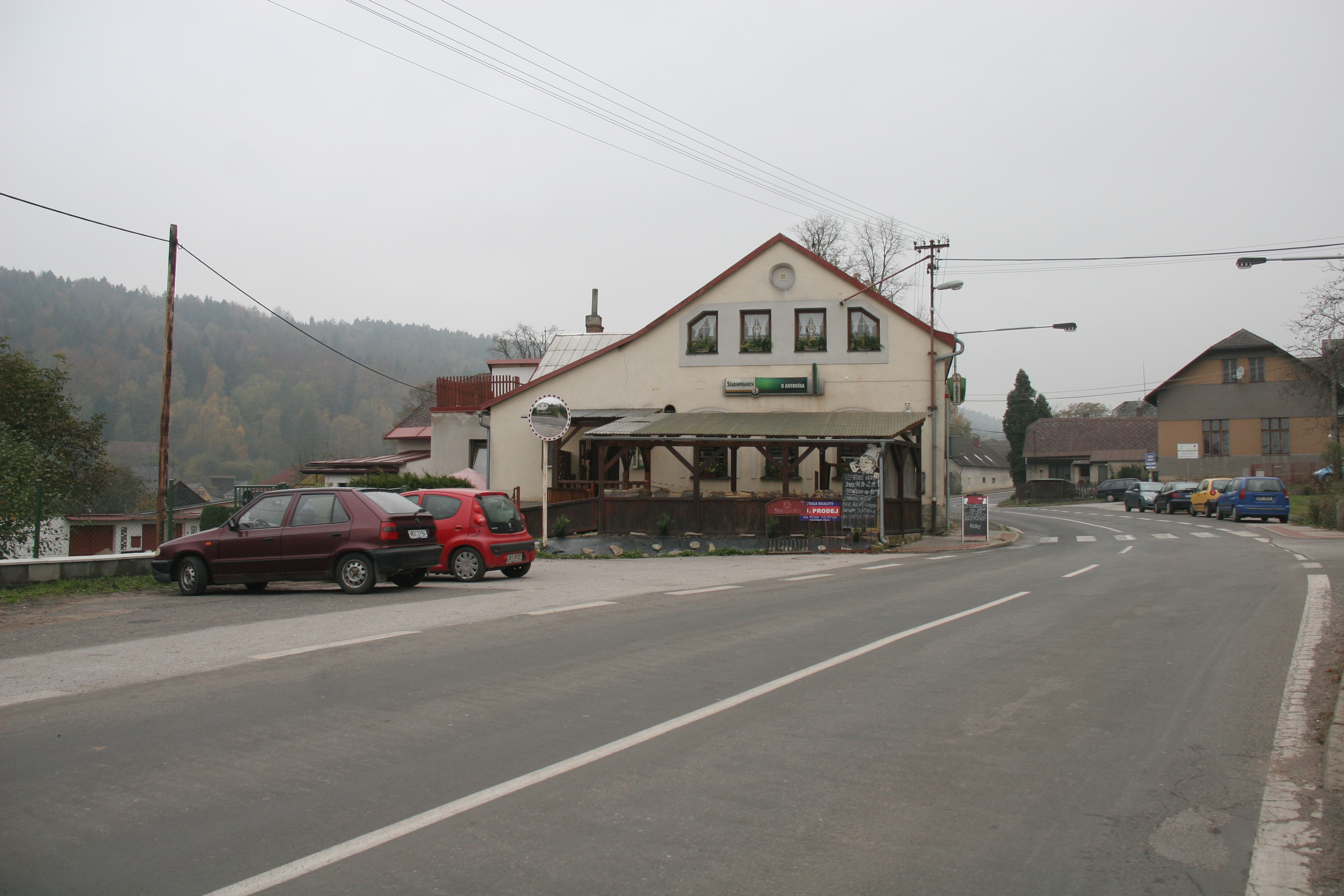 Lipnice hospoda